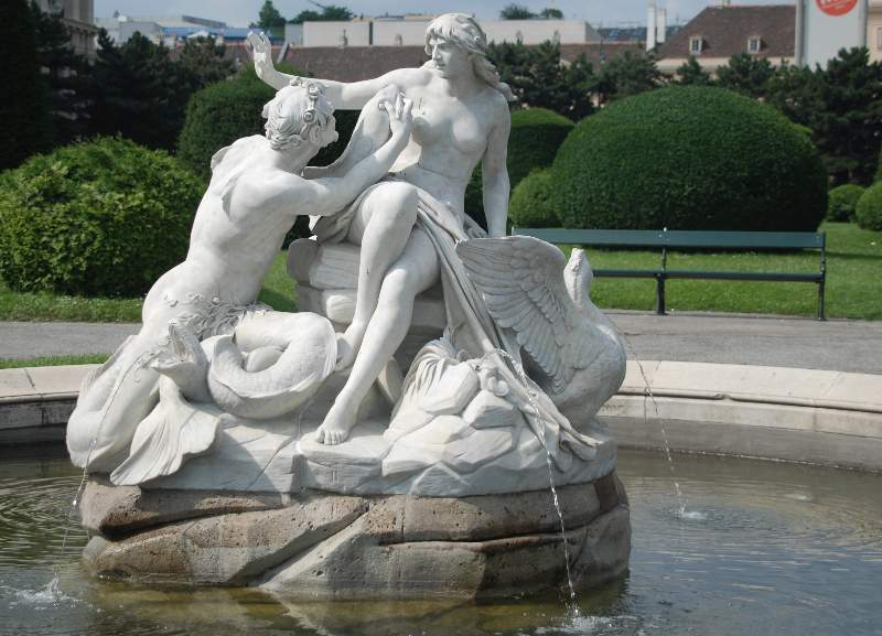 Brunnen A (Kunsthistorisches Museum / Burgring, Anton Schmidgruber): Die insgesamt vier Tritonen- und Najadenbrunnen bilden die Zentren der vier großen Rasenflächen, welche durch die Hauptverbindungswege des Maria-Theresien-Platzes gebildet werden. Errichtet wurden die Brunnen in den Jahren 1887 bis 1890.